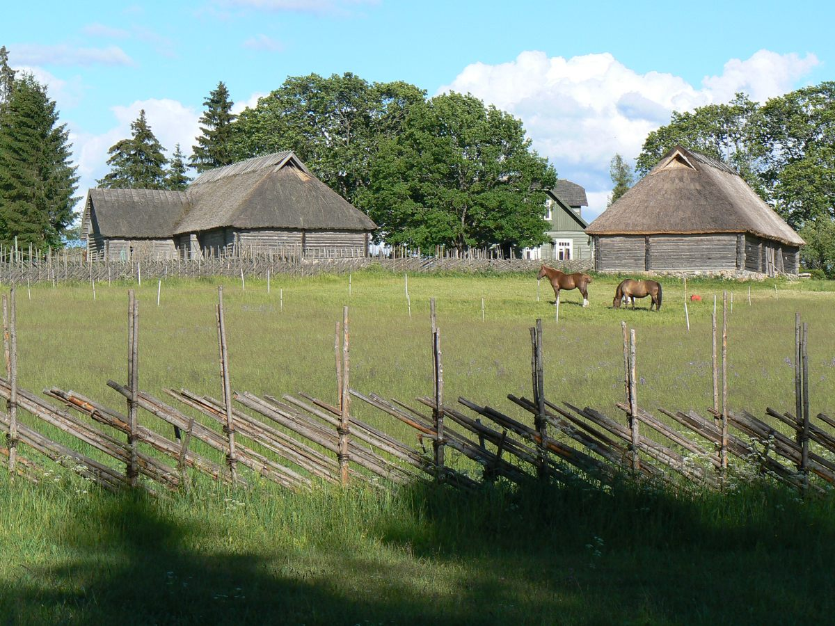 Tammsaare Põhjatalu